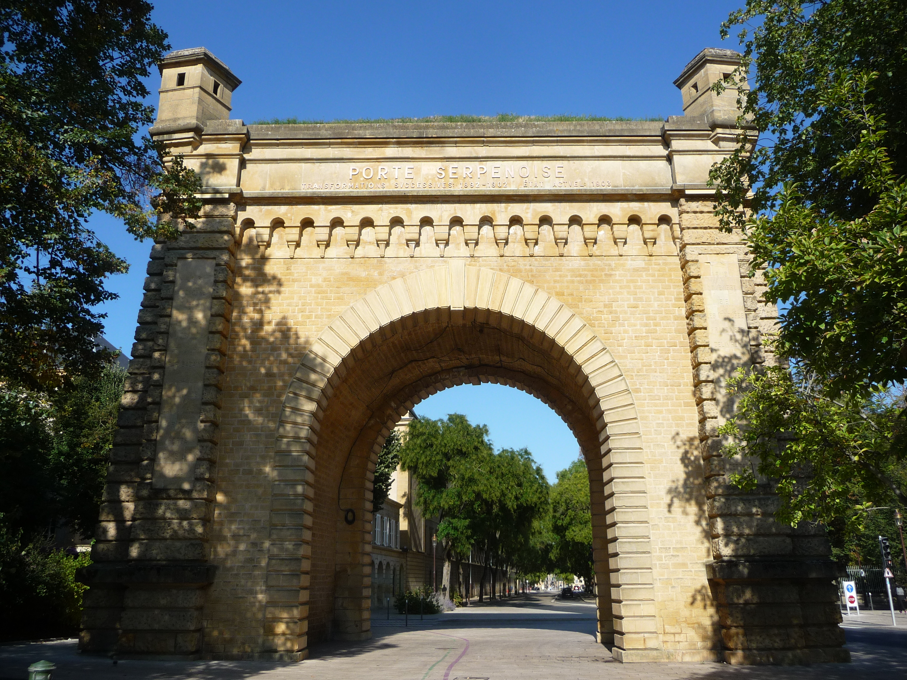 La porte Serpenoise est une porte de ville située à l’angle de l’avenue Robert Schuman et de la rue du Général Gaston-Dupuis dans le quartier de Metz-Centre. Elle reste le témoin symbolique associé à plusieurs événements historiques de la ville de Metz, dont elle a marqué la limite sud du IIIe siècle lors de la construction du rempart romain, jusqu’au début du XXe siècle au moment de la destruction de l’enceinte.